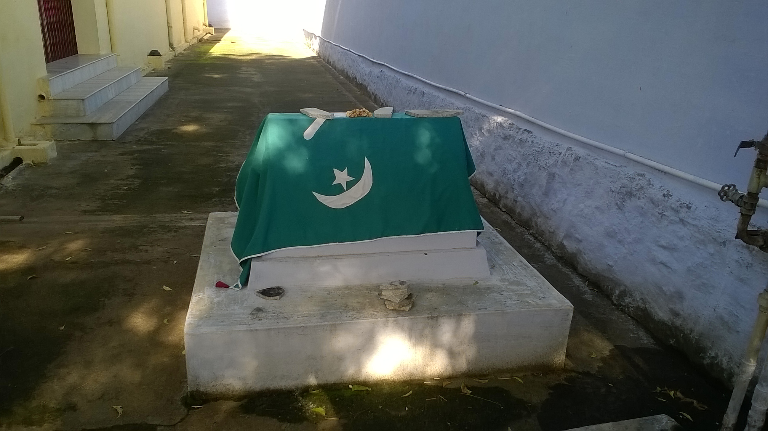 கட்டுரைக்கு